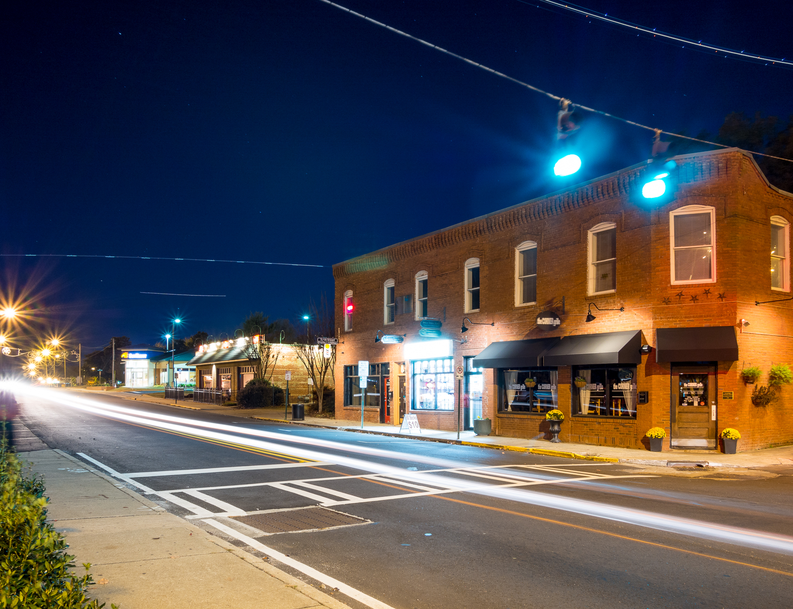 College Park, GA